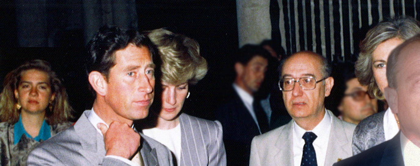 Foto de la visita a Toledo (España) de Carlos de Inglaterra y Diana Spencer. Acompañan la Reina Sofía y la Infanta Cristina, así como Vicente Antonio Rodríguez Redondo.